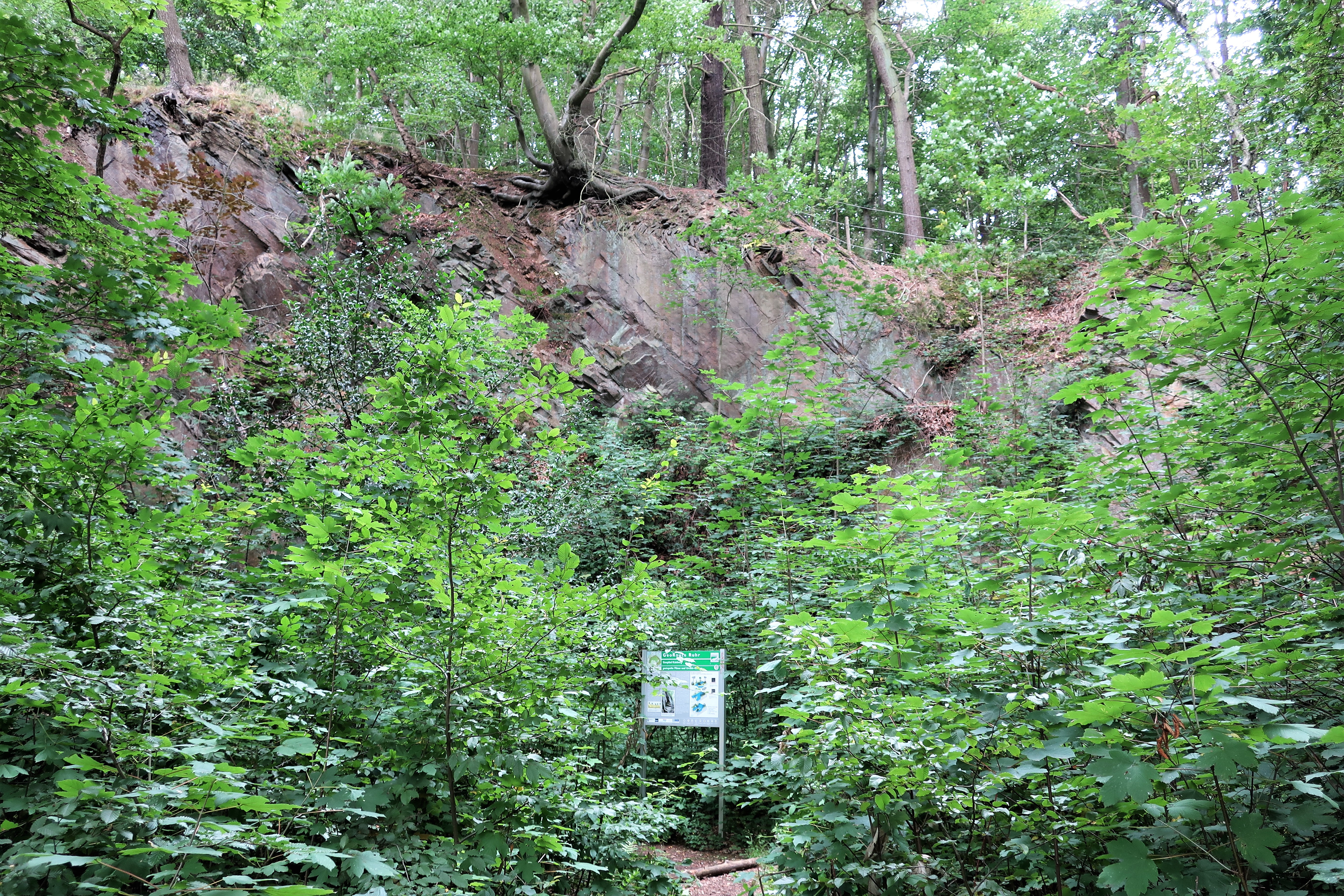 Geschützter Landschaftsbestandteil 1.4.2.9 „Steinbrüche am Kaisberg“ in Hagen, am nordöstlichen Hang des Kaisberges (Foto: 80 m lange und bis 15 m hohe Felswand). Es handelt sich um ehemalige Steinbrüche im Grenzsandstein zwischen dem Flözleeren und dem Produktiven Oberkarbon mit eingelagerten Ton und Mergelschichten (Kaisberg-Konglomerat).